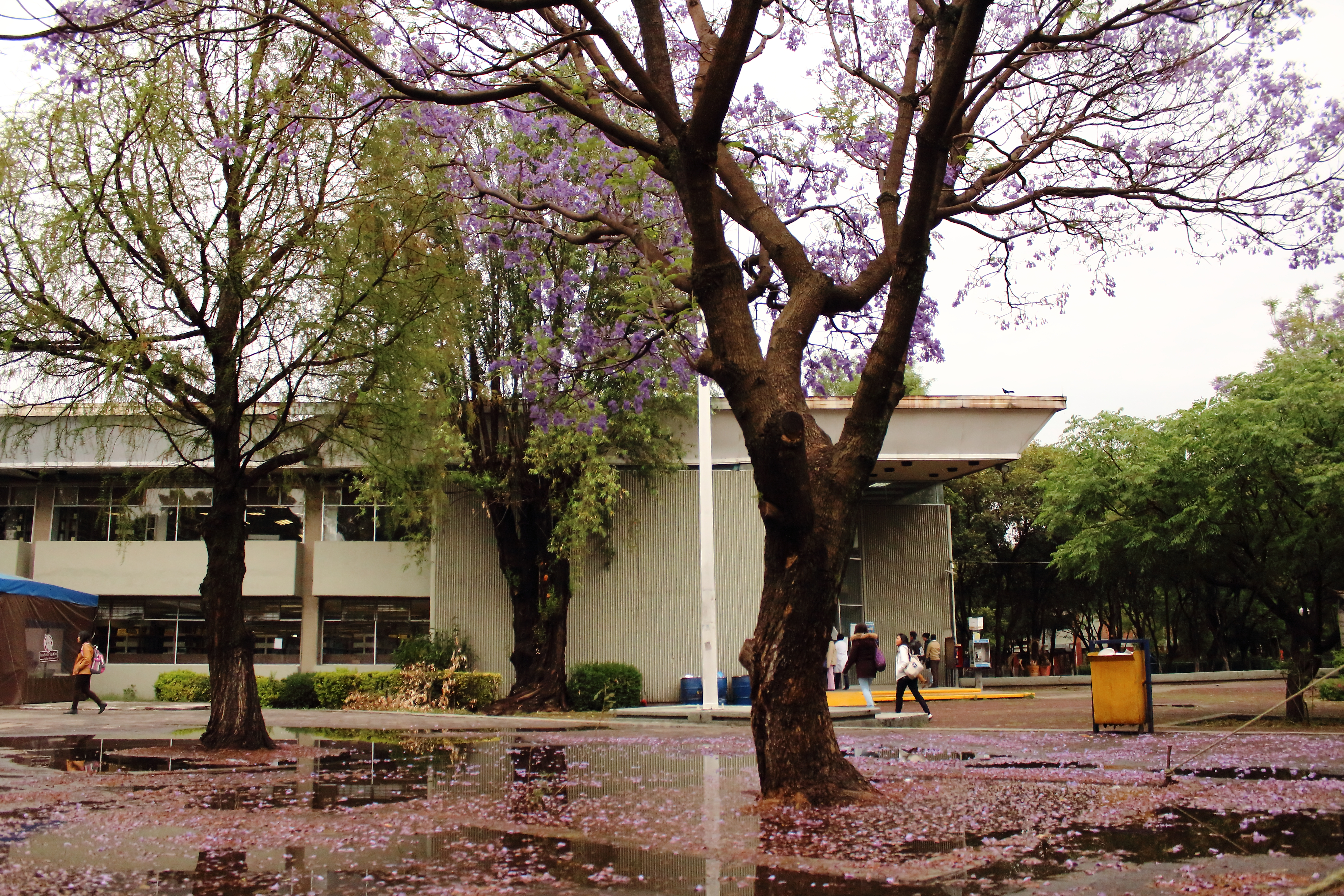 Biblioteca de la FES-Cuautitlán después de un día de lluvia.